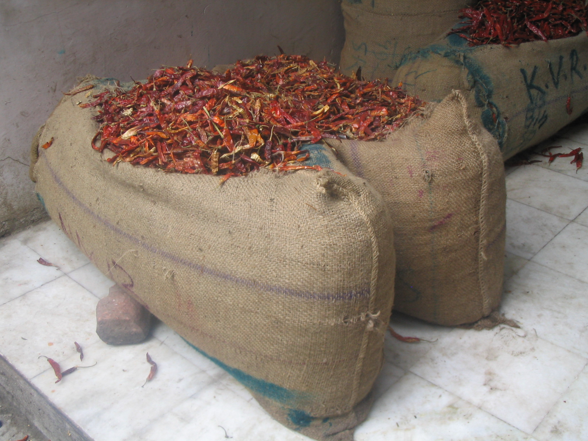 Rode Peper in zakken in India